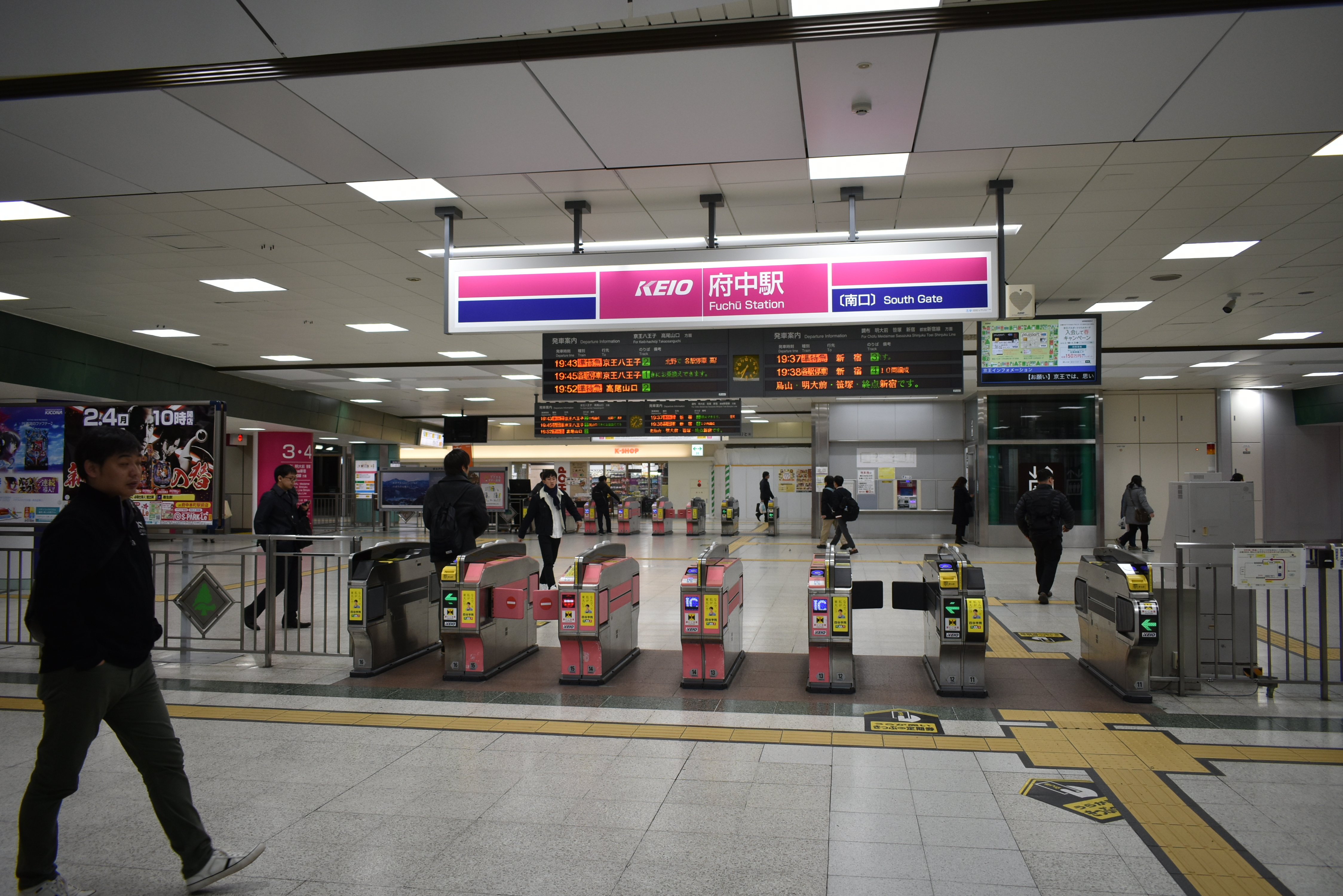 府中駅改札 Nikon D3400